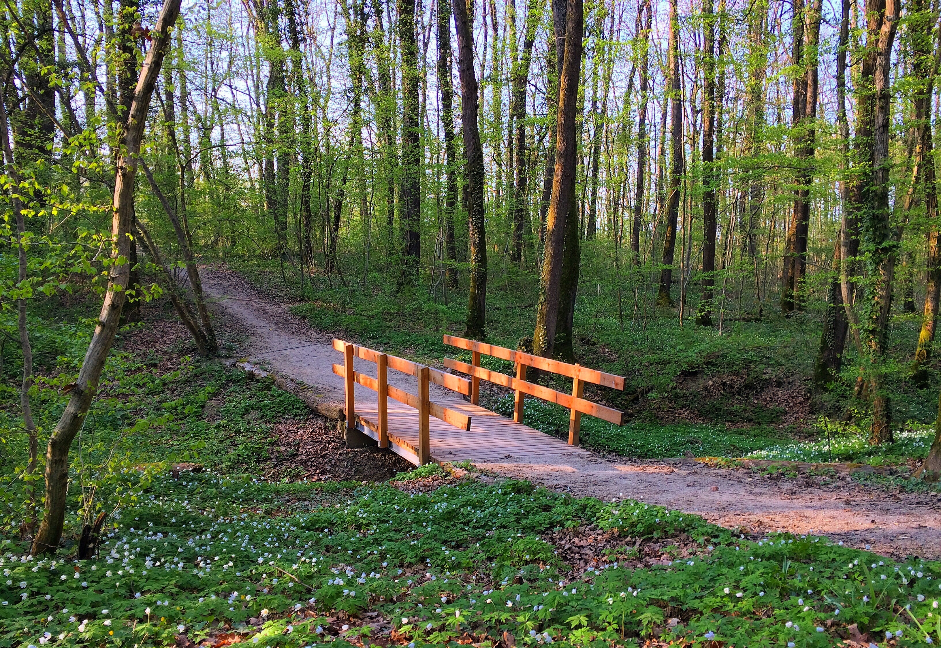 La promenade Panissod passant par le Bois de le Foretaille à Pregny-Chambésy, dans la campagne genevoise.